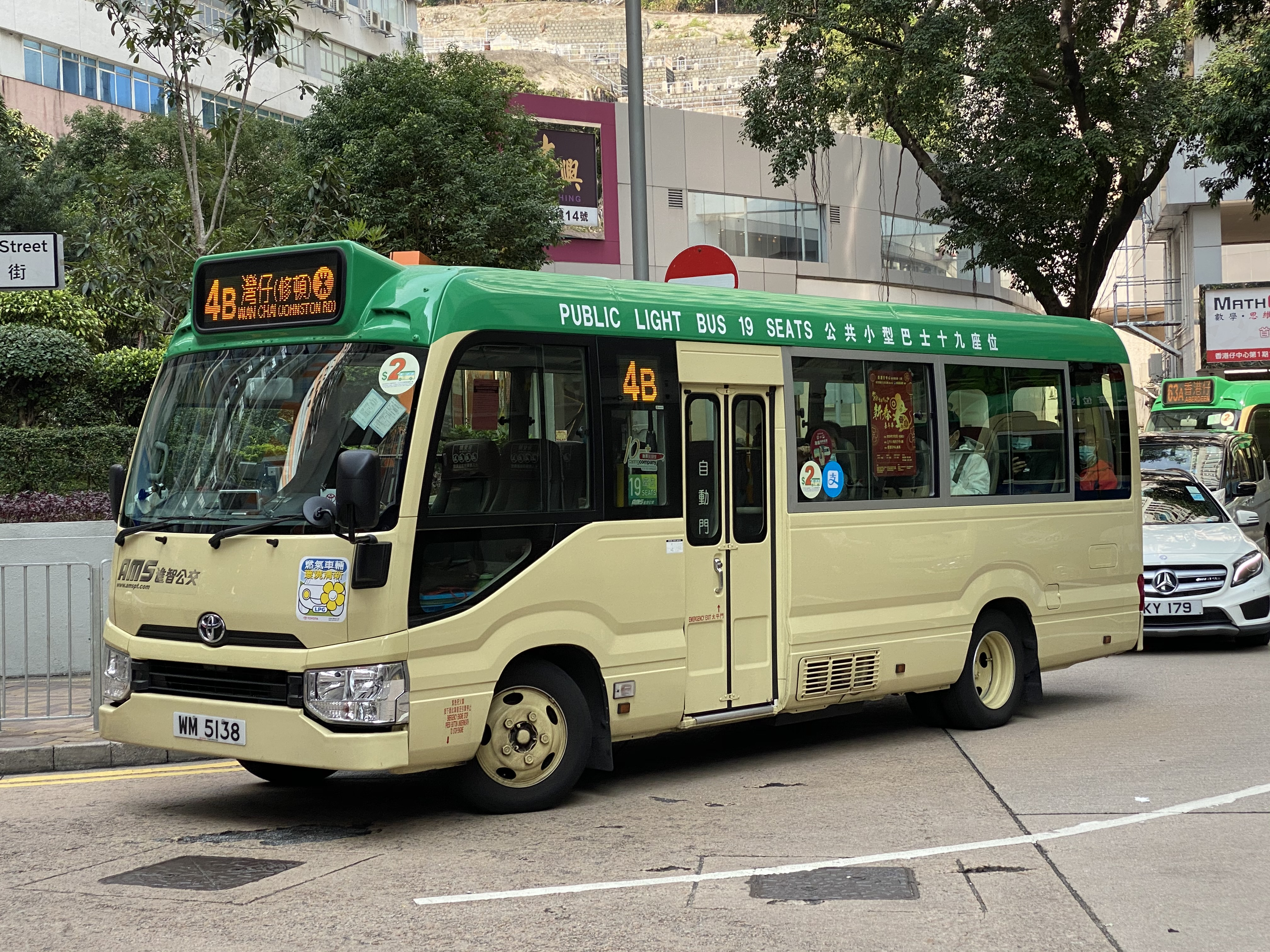 中文（香港）: This photo is taken in Aberdeen.